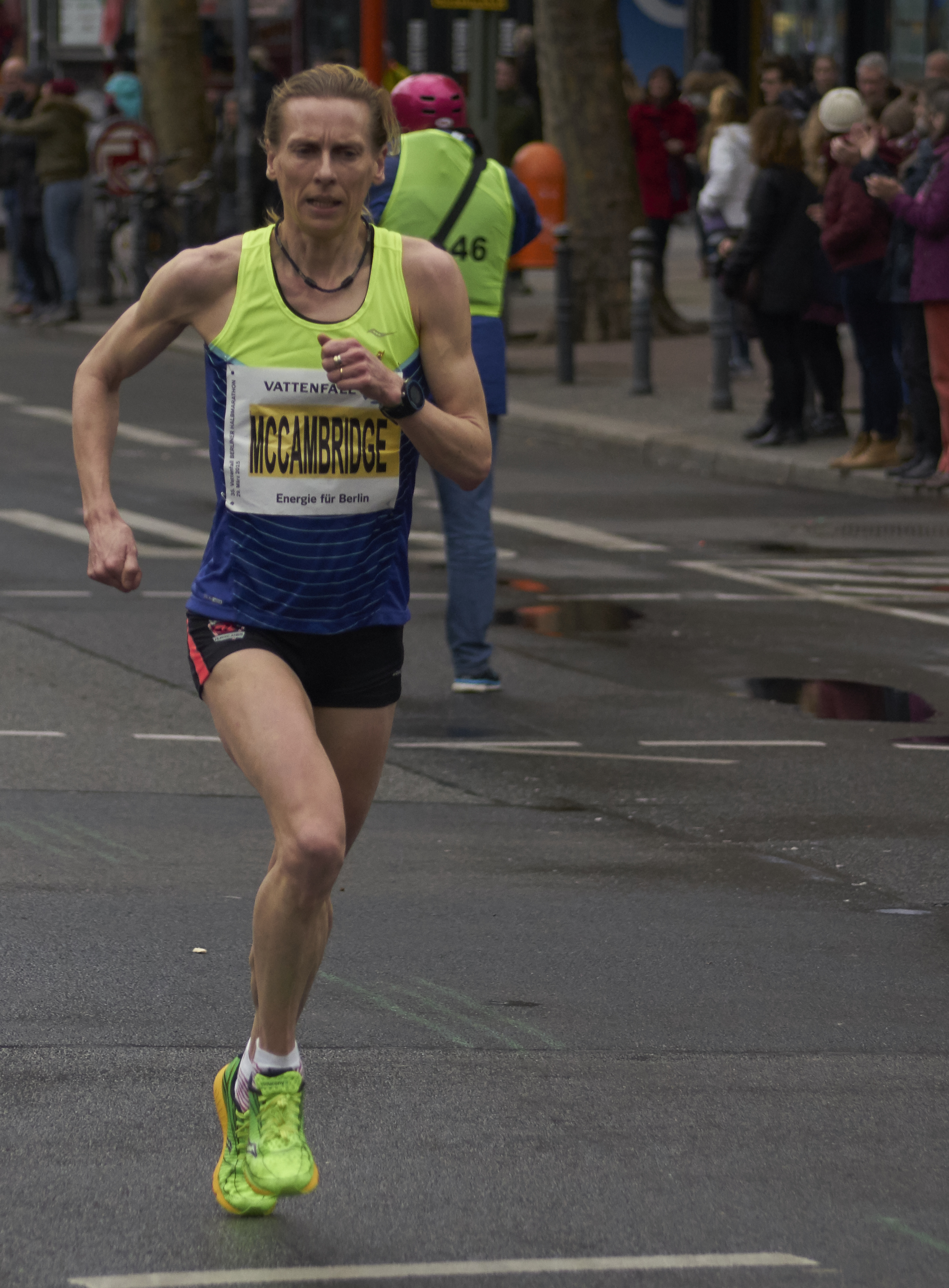 Berliner Halbmarathon 2015, Maria McCambridge